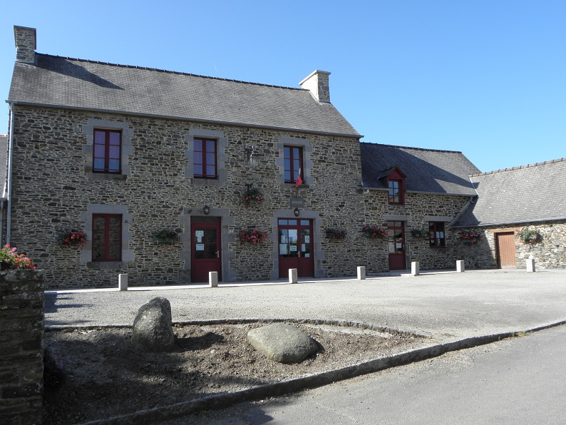 Mairie de Lillemer (35).